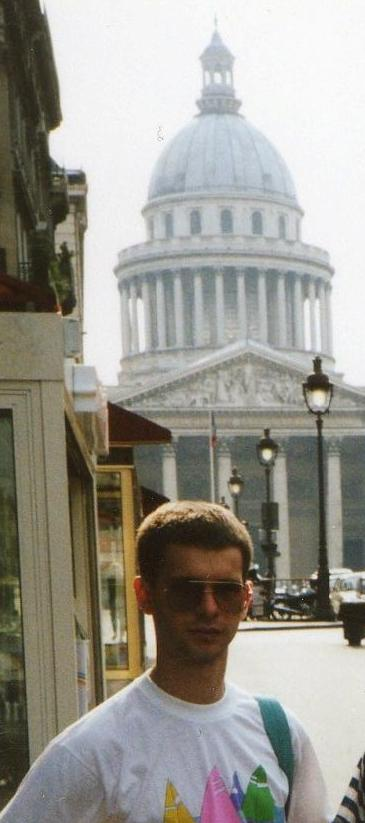 Robert Gucwa, 1991-08-05